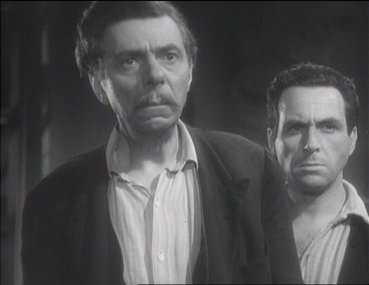 Screenshot del film Quattro passi fra le nuvole (1942) di Alessandro Blasetti.